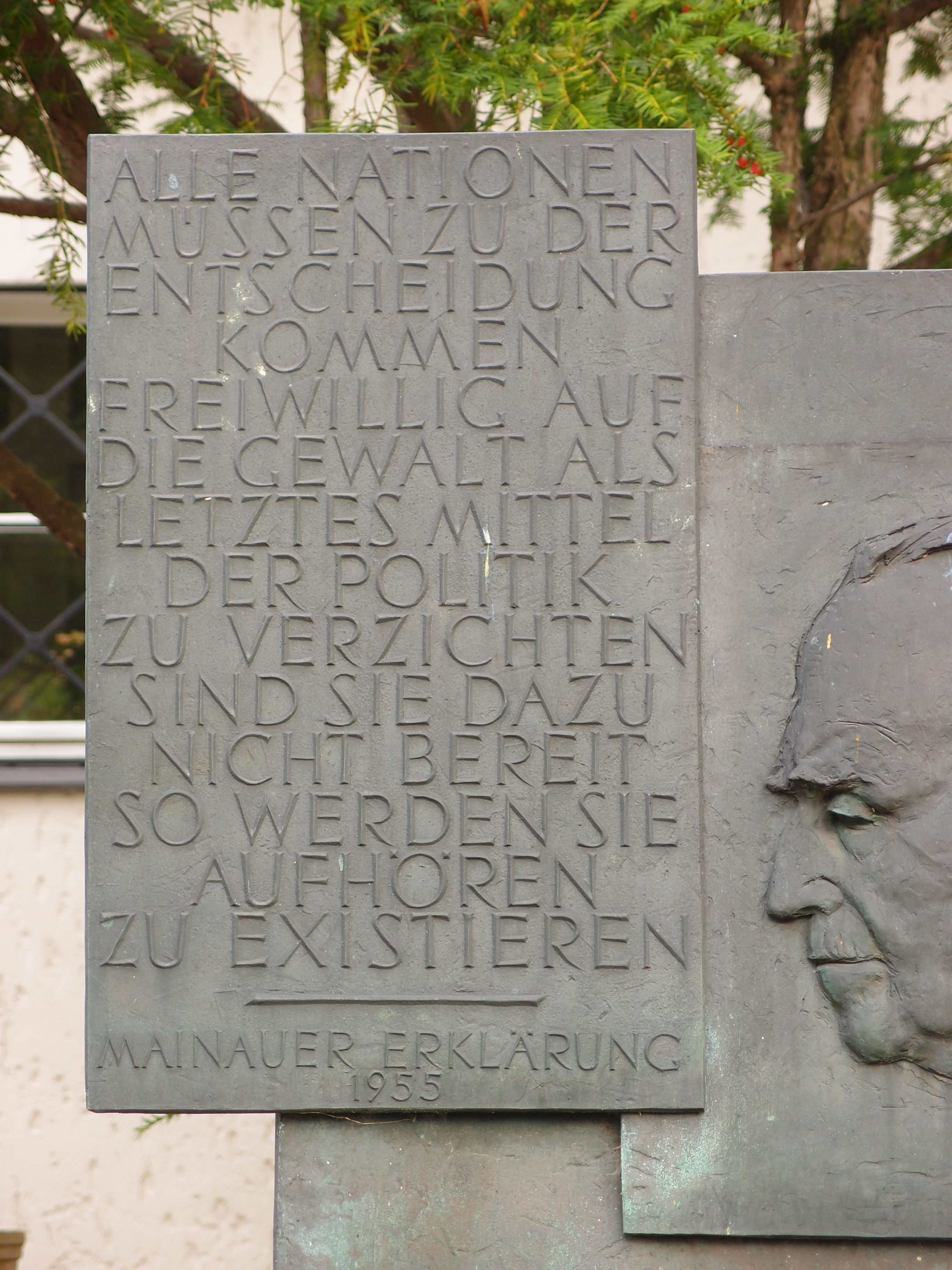 Erinnerung an die „Mainauer Erklärung“ am ehemaligen Wohnhaus von Otto Hahn in Berlin, Altensteinstr. 48